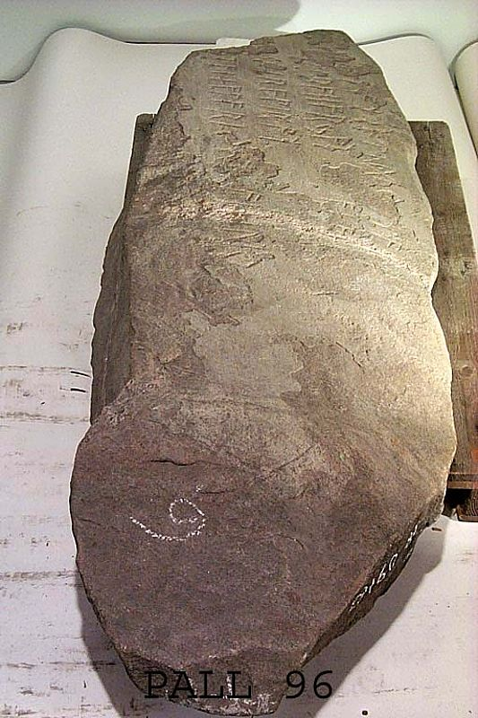 Röstenen.